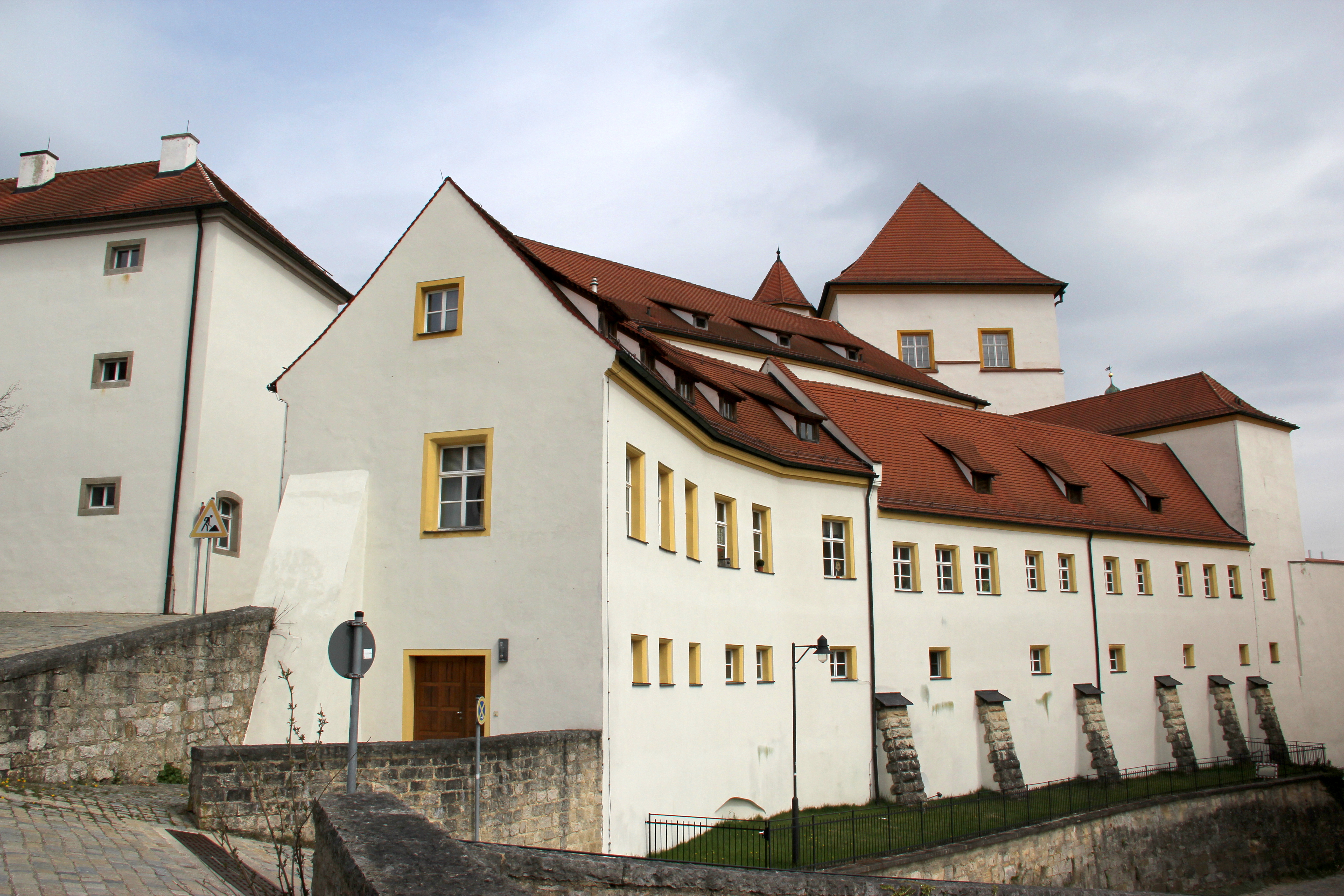 Burg